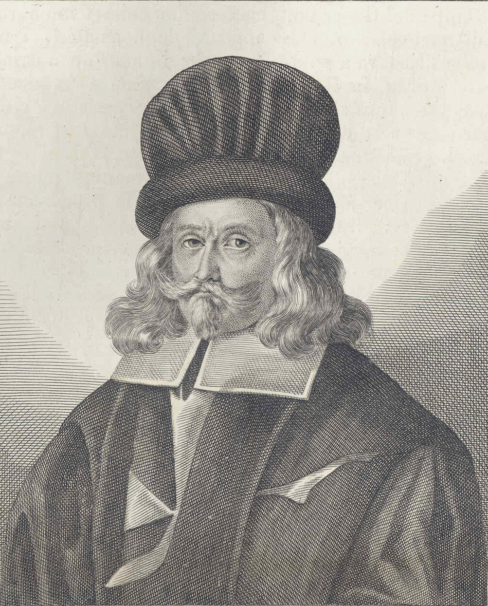 autore: Rajola disegnatore e Morghen incisore, Da L'Omnibus Pittoresco n.14 del 21 giugno 1838, Ritratto di Mattia Preti, autore, opera il cui autore è morto da più di 70 anni, acquisita da scanner